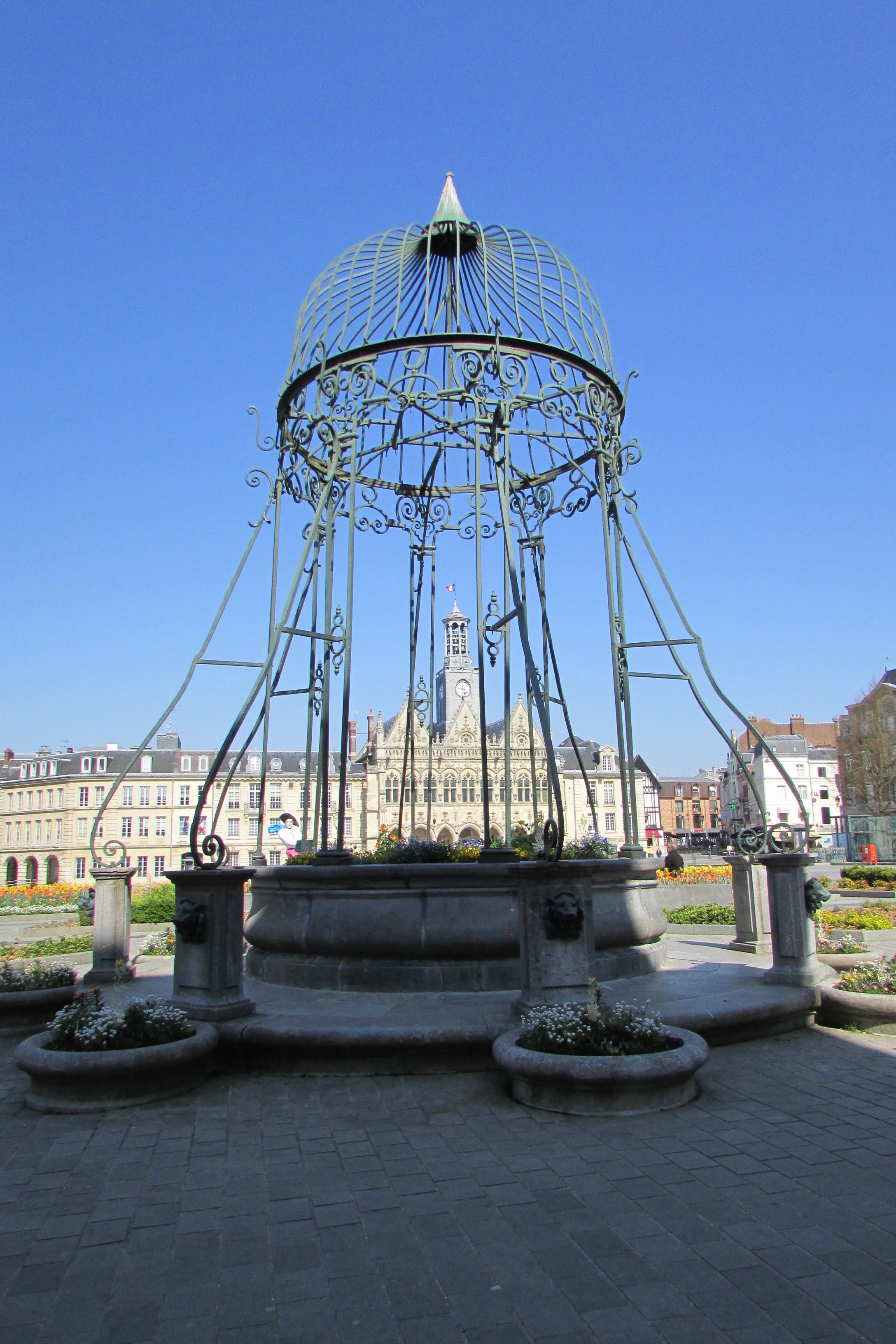 Le vieux puits